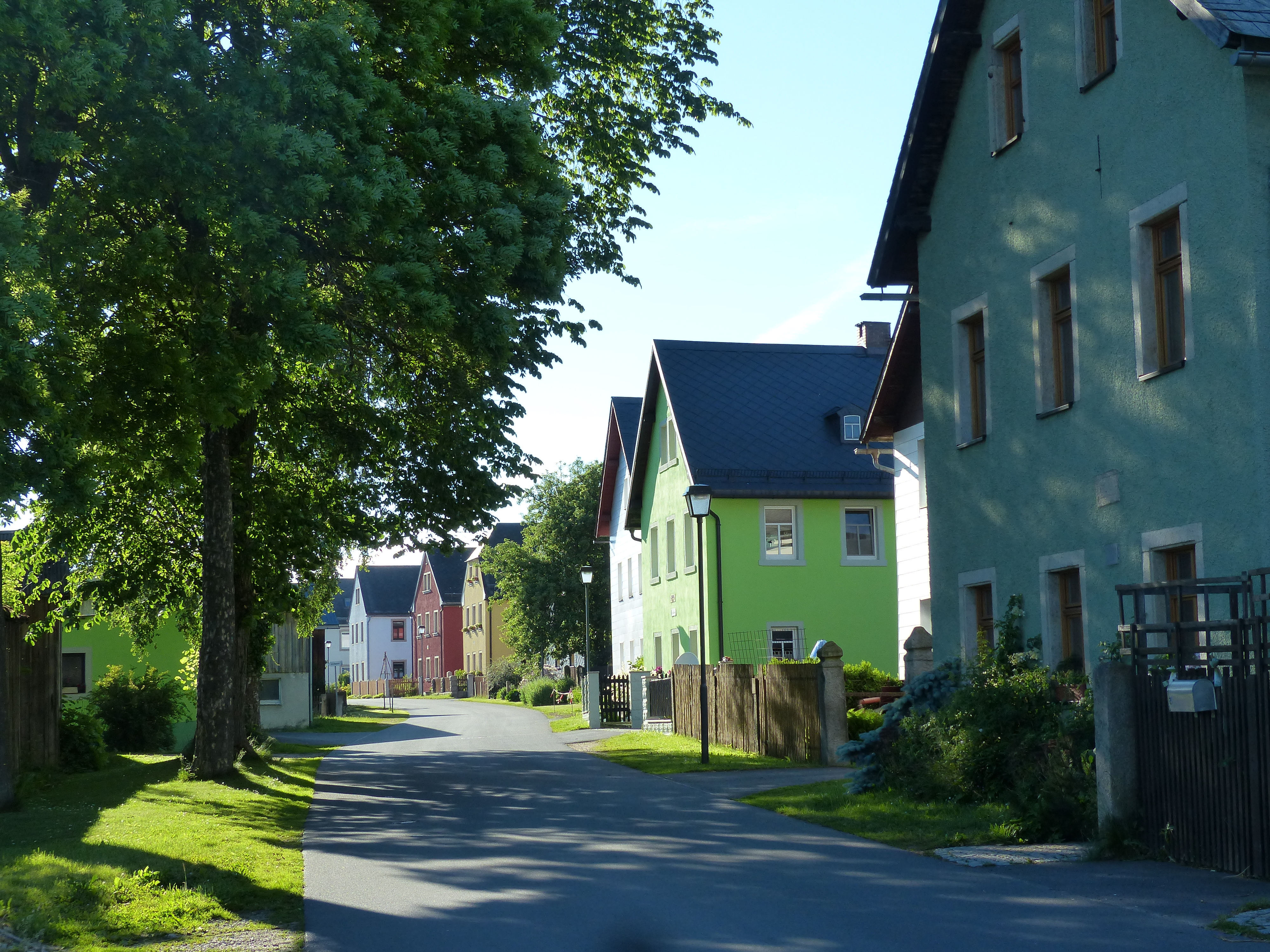 Ortsansichten von Reicholdsgrün